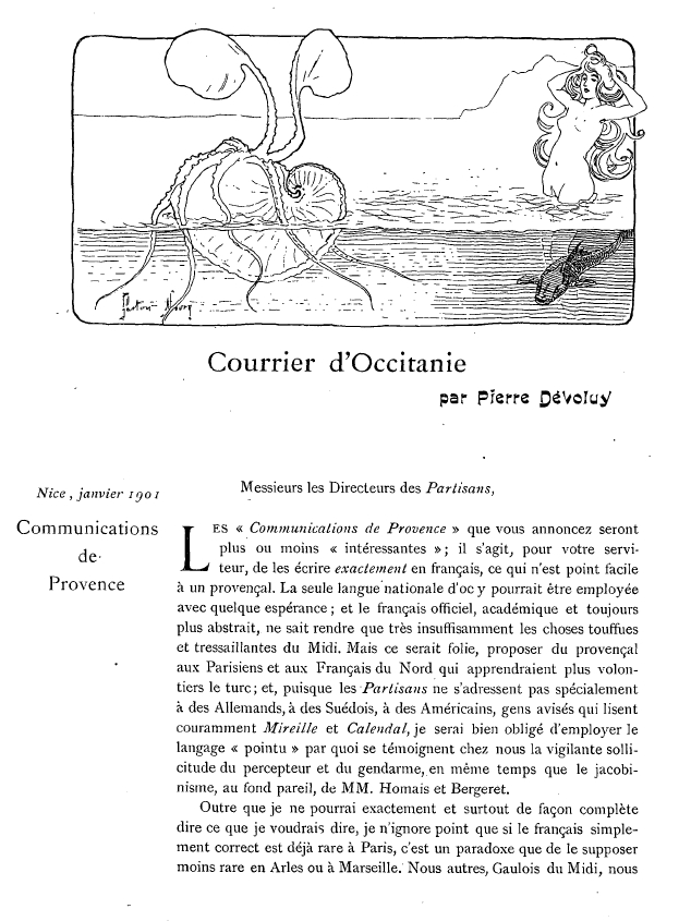 Primièra pagina de l'article "Courrier d'Occitanie" de Pierre Dévoluy dins la revista "Les Partisans", Paris, 5 de genièr de 1901